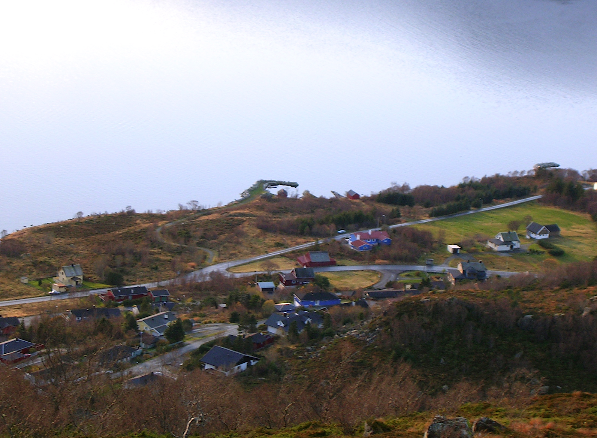 En liten del av Hellandshamn, Haram